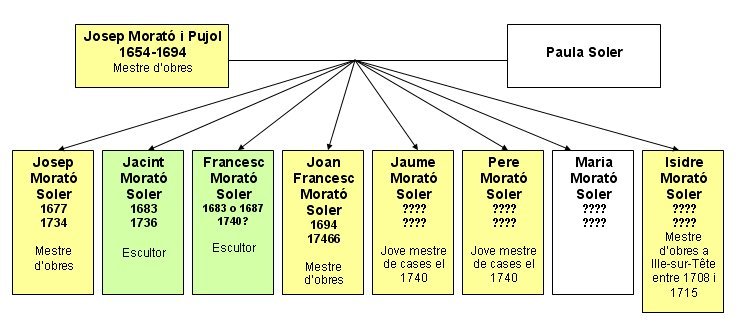 Esquema genealògic de la segona generació dels Morató, artistes oriünds de Vic